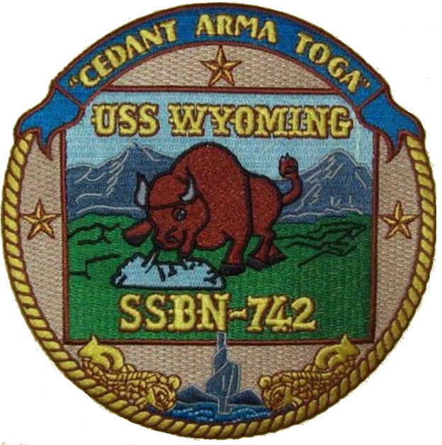 Cytat z Cycerona na emblemacie członków załogi okrętu podwodnego USS Wyoming (SSBN-742).